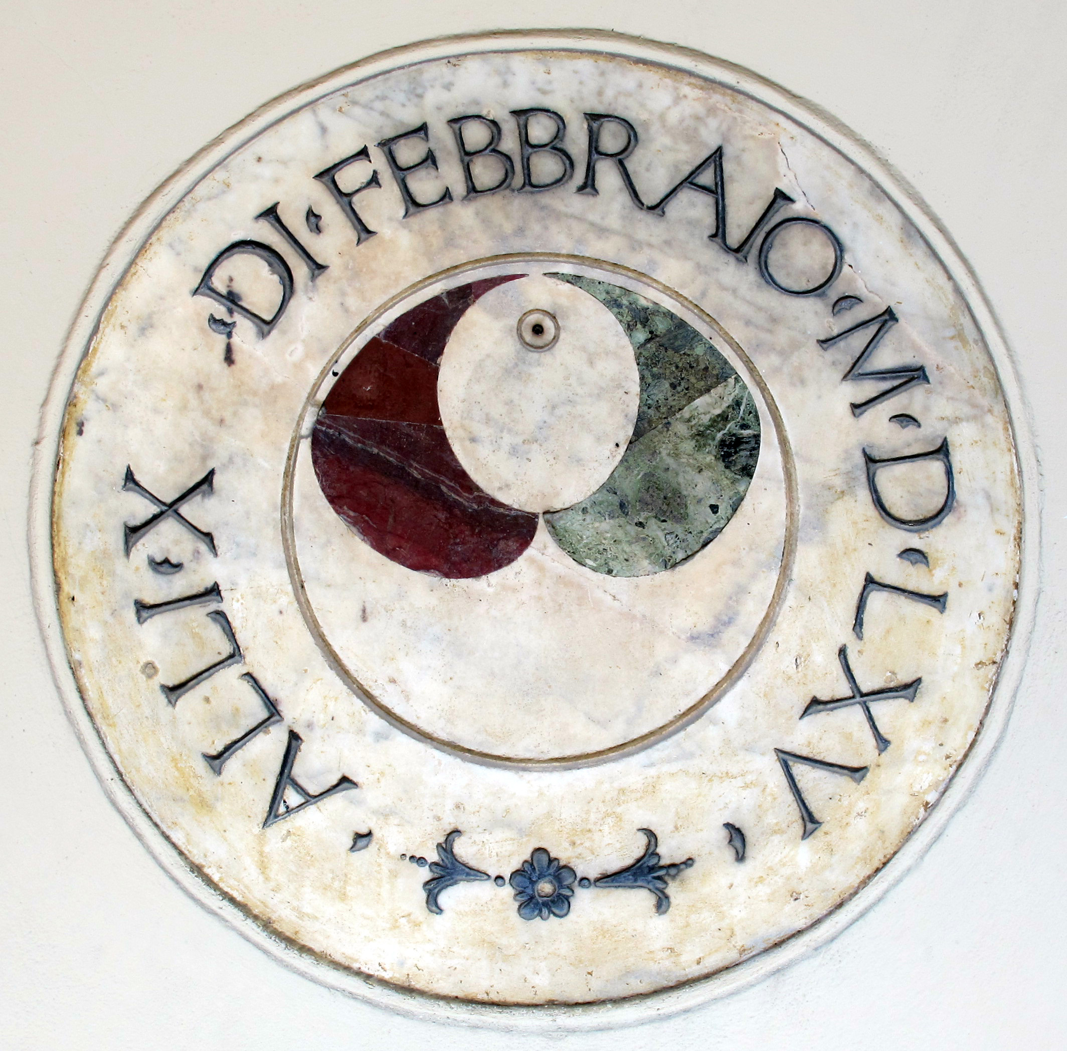 Palazo dell'antella, targa calcio storico